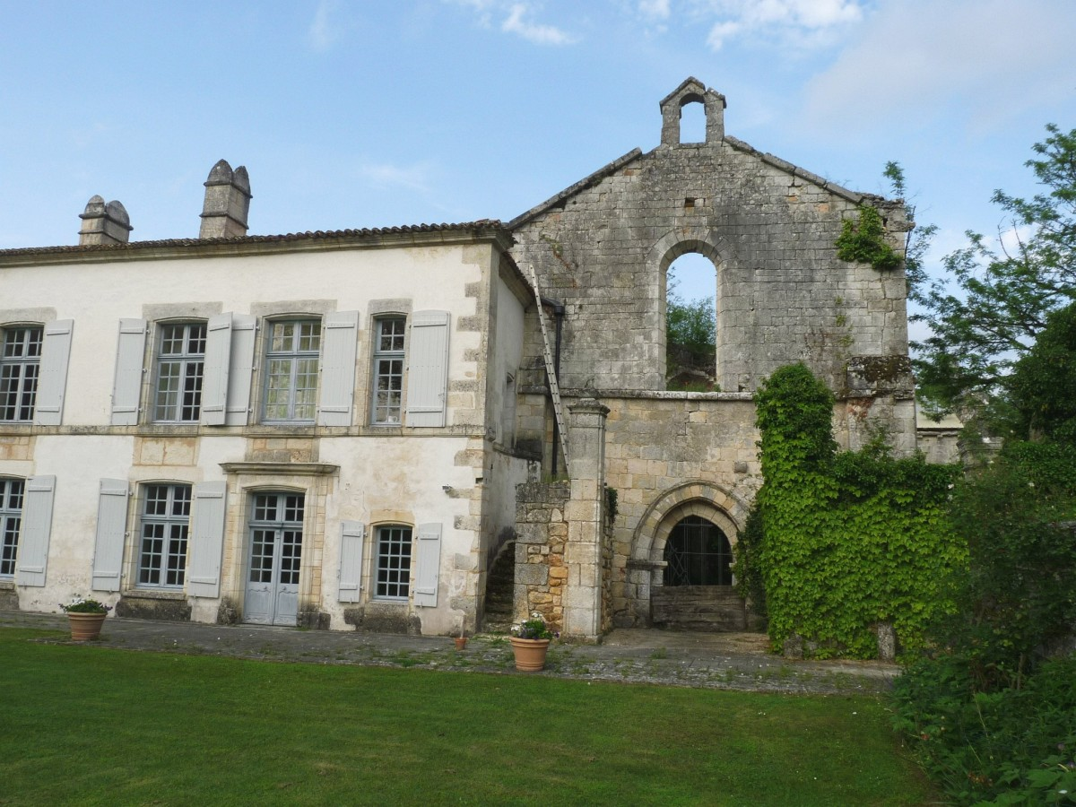 Abbaye de Grosbot (Charras, Charente, France). Aile ouest et façade de l'église